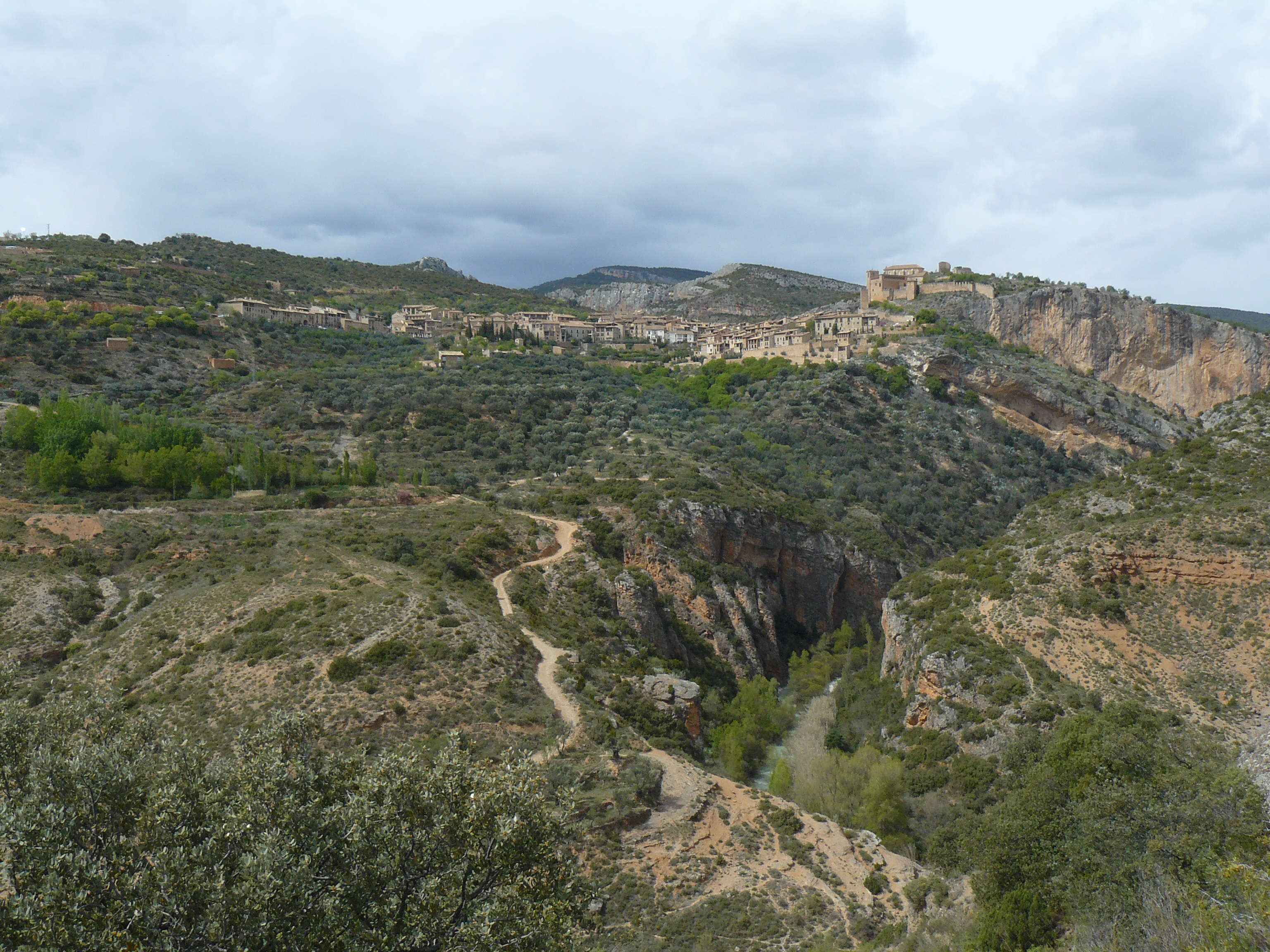 Alquézar, Huesca.